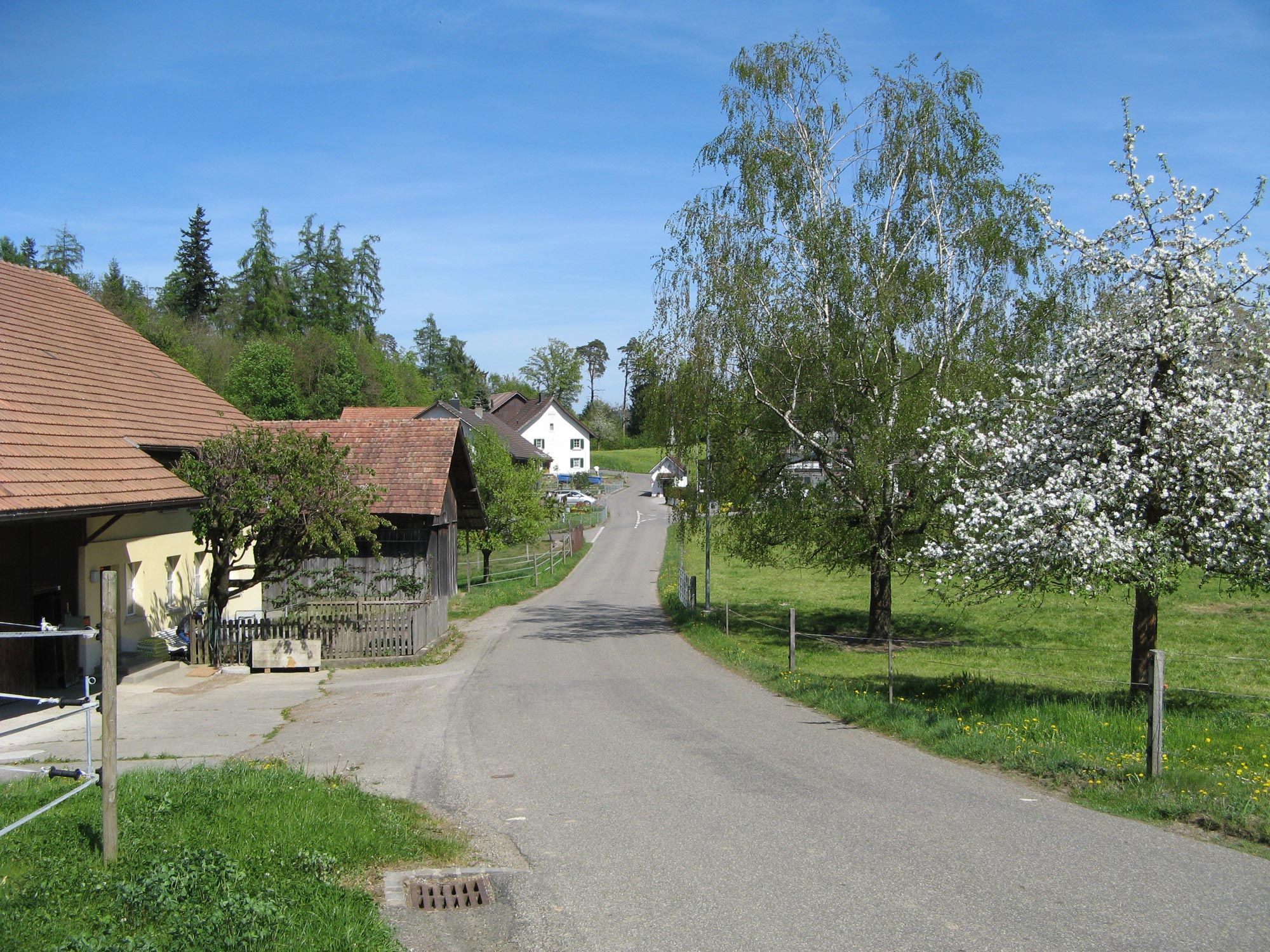 Ansicht des Weilers Büschikon bei Tägerig